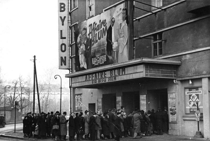 Berlin, Kino Babylon , Schlange für "Affaire Blum" ADN-ZB/Heilig Aus der Geschichte der DEFA 1949 Im Berliner Filmtheater "Babylon" efreute sich der DEFA-Film "Affaire Blum" unter der Regie von Erich Engels eines regen Zuspruchs.